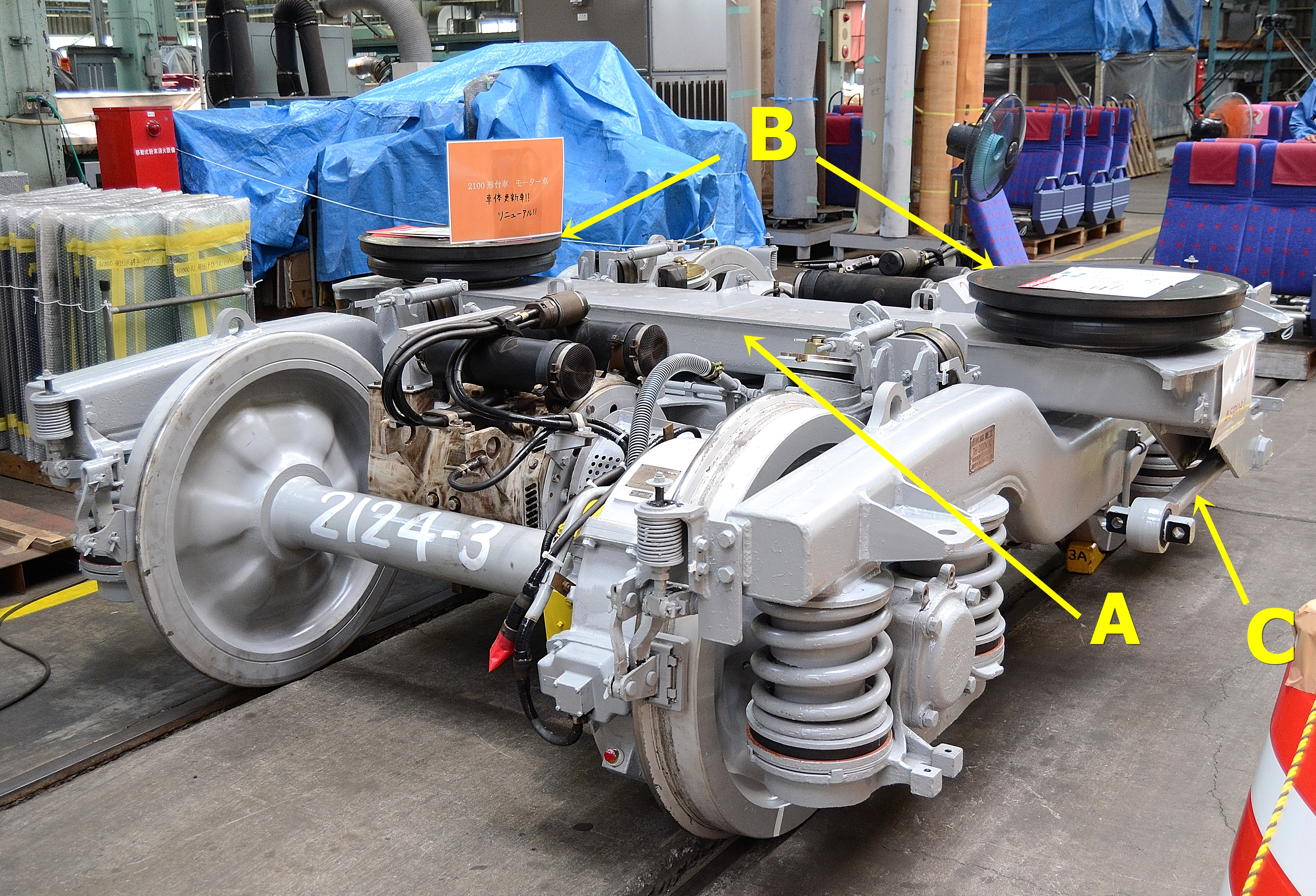 京急2100形のダイレクトマウント式のボルスタ（枕梁）付き台車（2016年の久里浜工場で開催された京急ファミリー鉄道フェスタにおいて撮影）